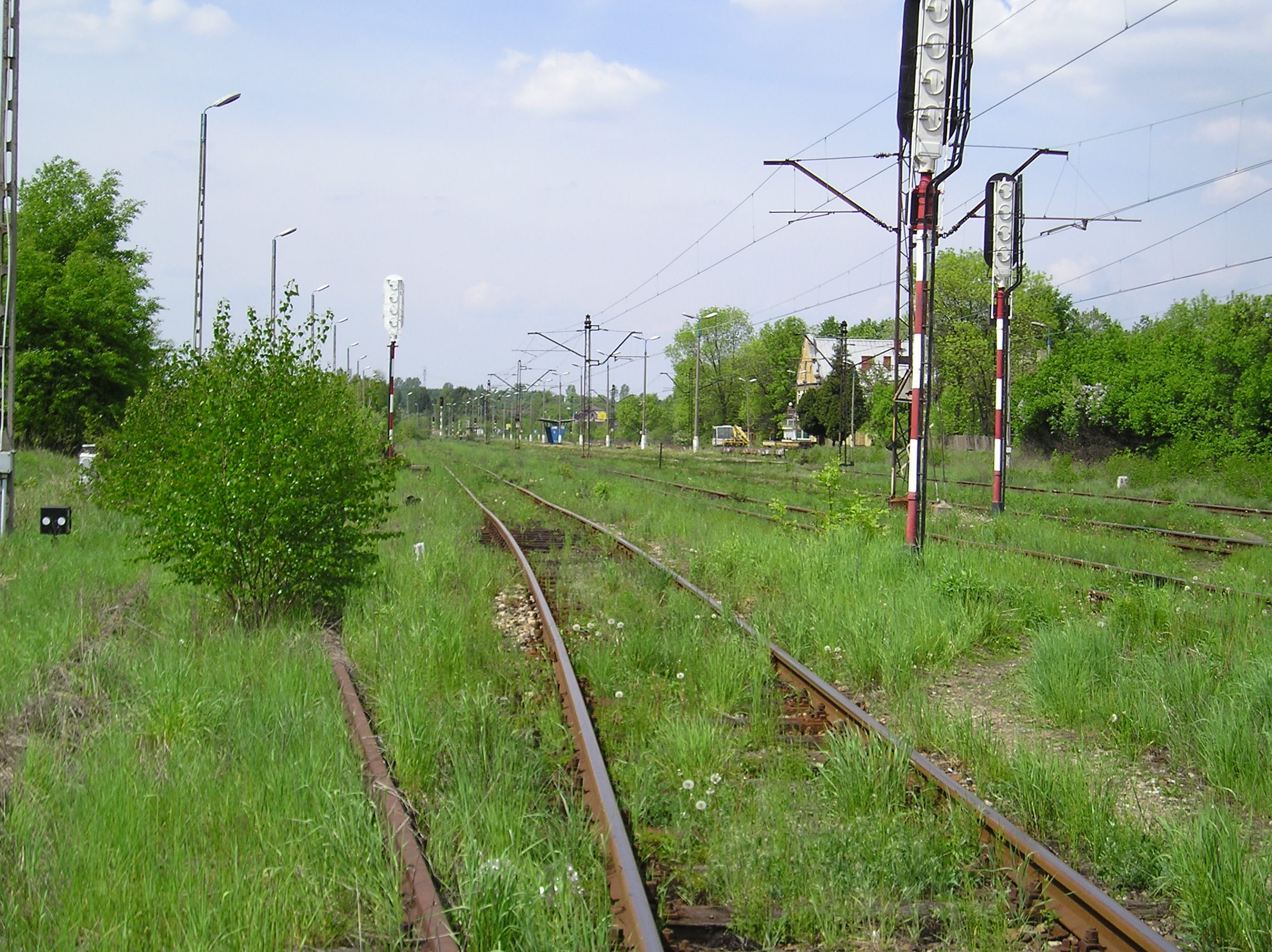 Torowisko na stacji kolejowej Sławków (woj. śląskie)